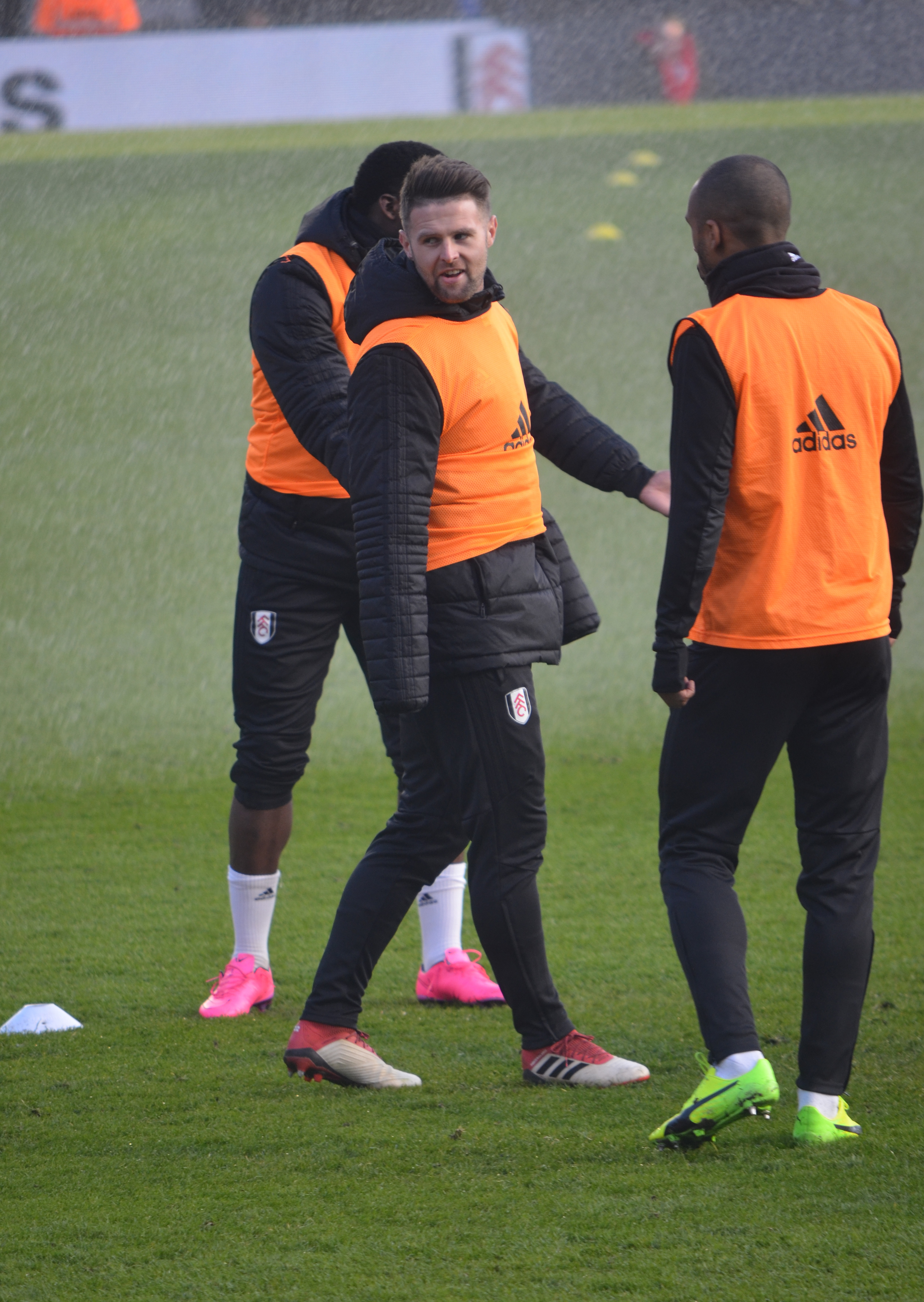 Ollie Norwood, Fulham FC